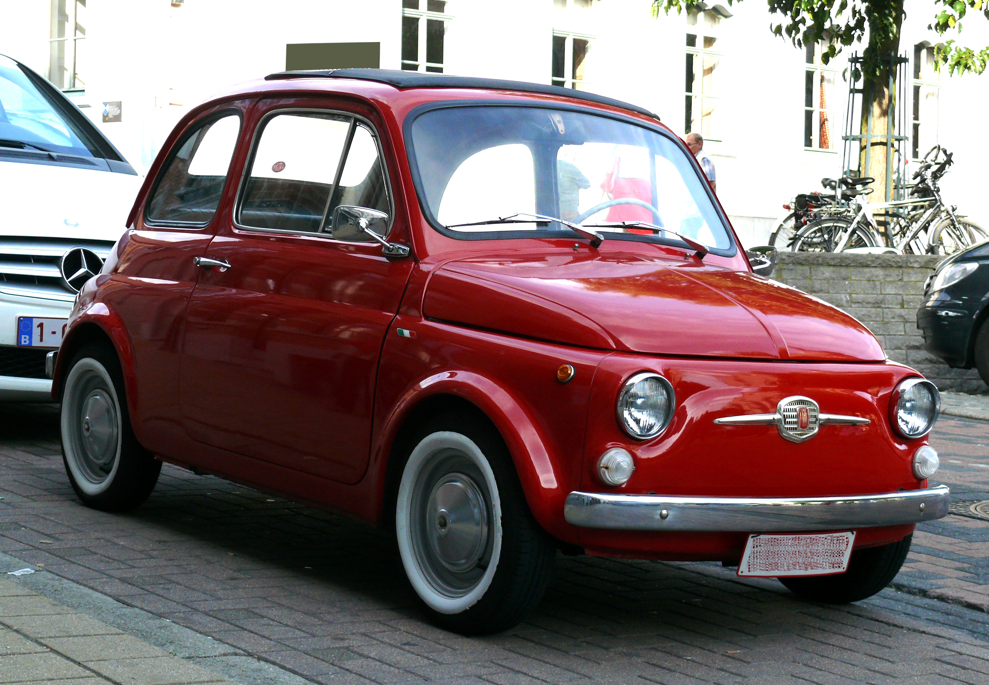 Fiat Nuova 500